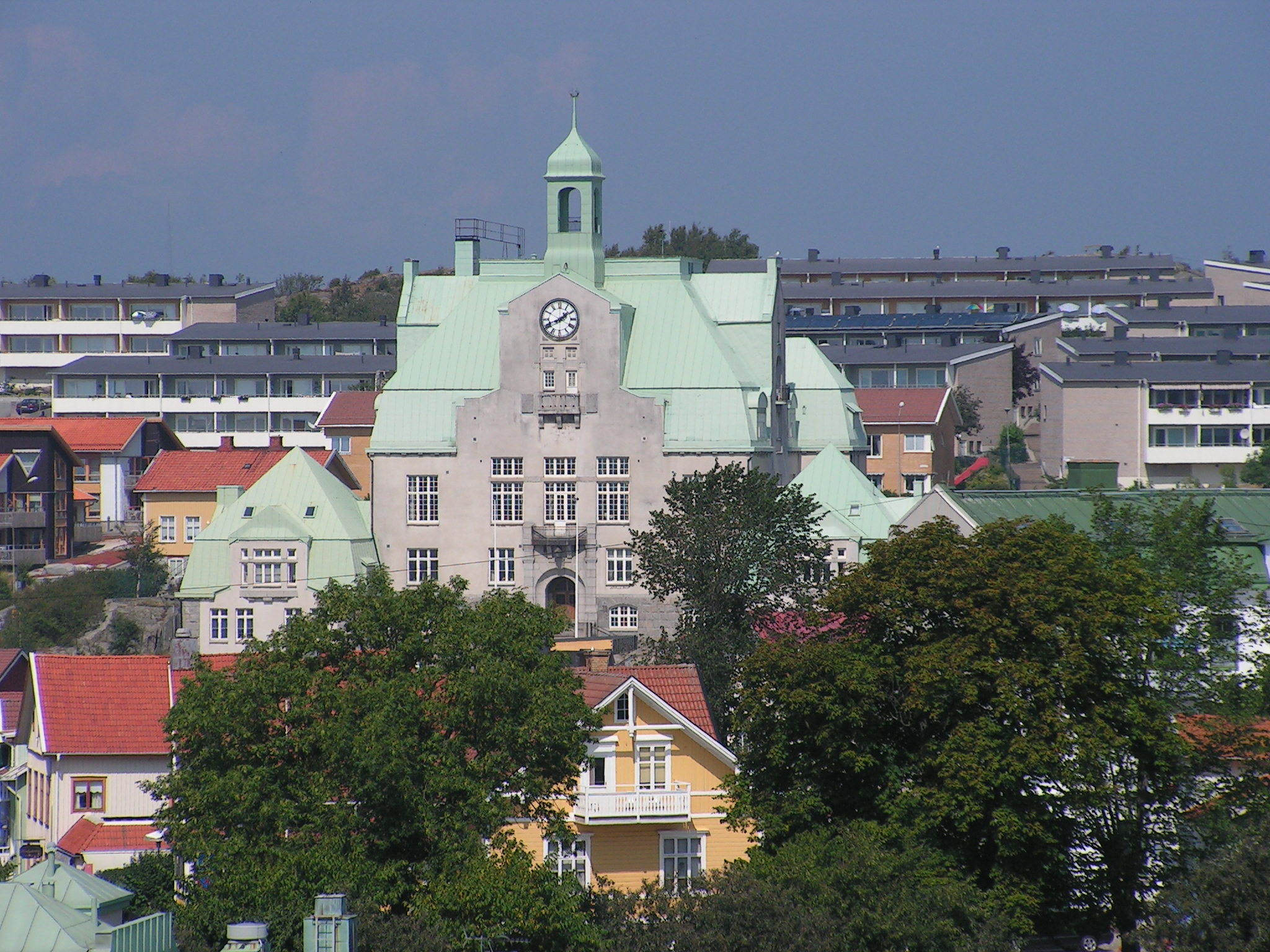 Strömstads stadshus / City hall of Strömstad, Sweden